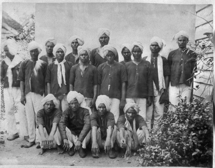 Foto. Een groep Brits-Indische immigranten gefotografeerd in de tuin van de fotograaf